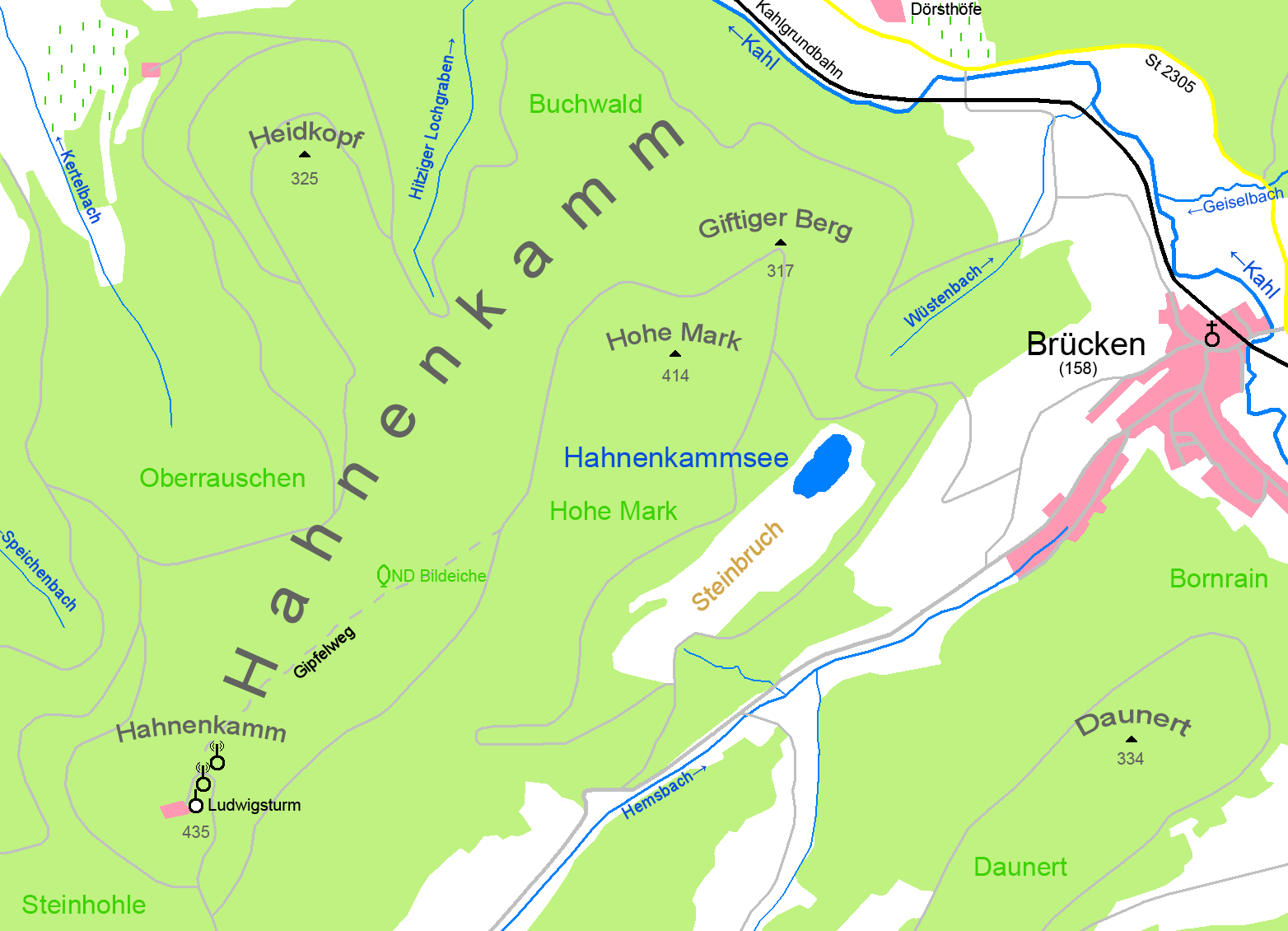 Der Hahnenkammsee am Hahnekamm im Spessart Siedlungsfläche Wald Hauptstraße Kirche Sendemast Aussichtsturm Naturdenkmal Grünfläche Gewässer Nebenstraße Wald- und Feldweg Berg 435 Höhe über Normalhöhennull Fink Flurname